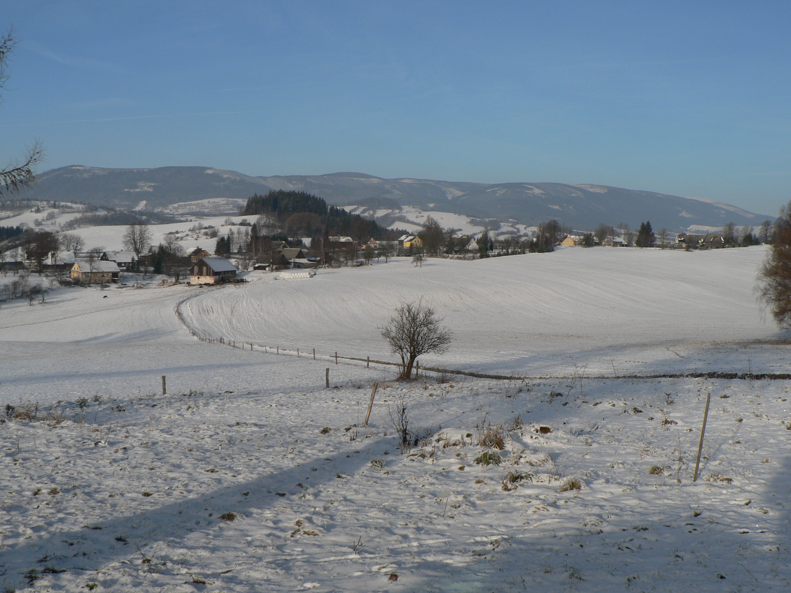 Západní část obce Habartice ze silnice na Hanušovice